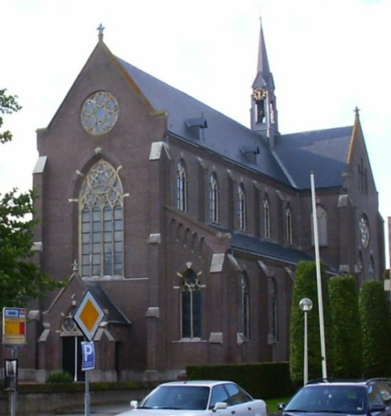 Eigen gemaakte foto van de RK-kerk te Haarsteeg.